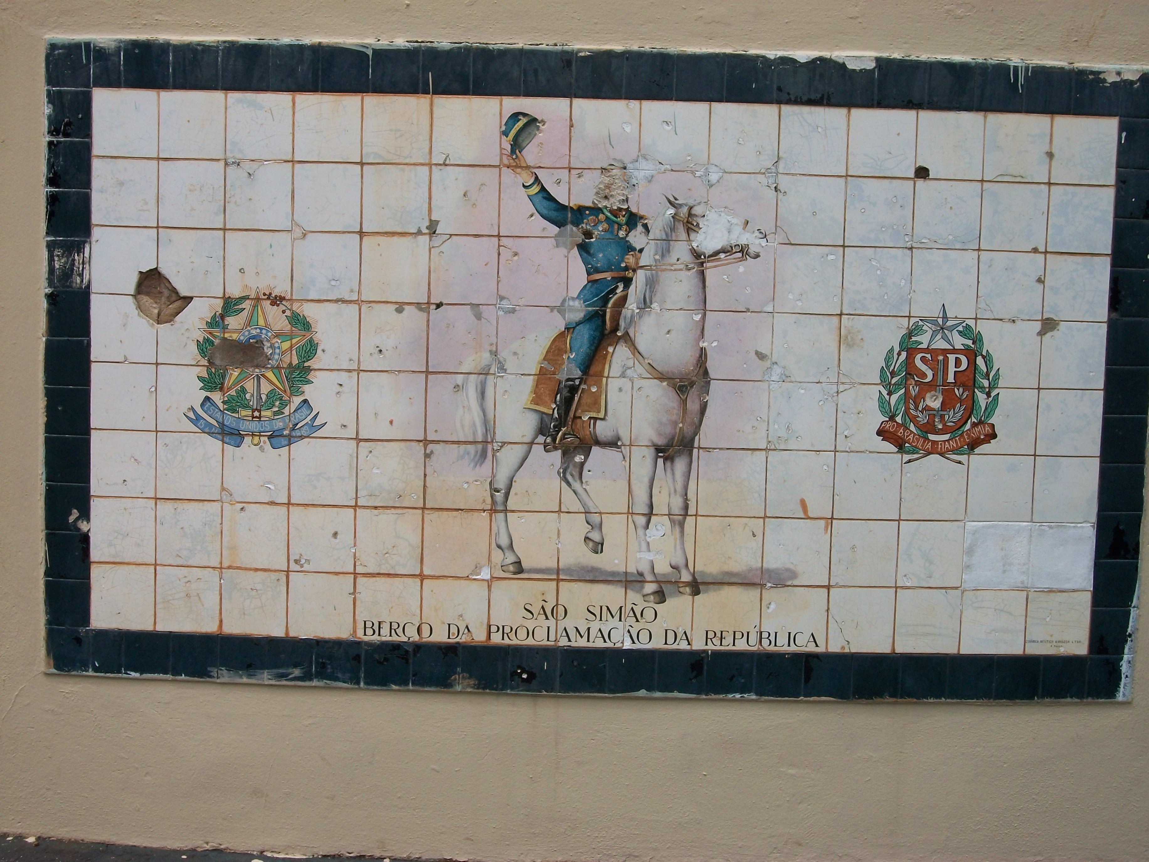 Painel em azulejos tratando da relação da cidade de São Simão com a Proclamação da República em 1889.